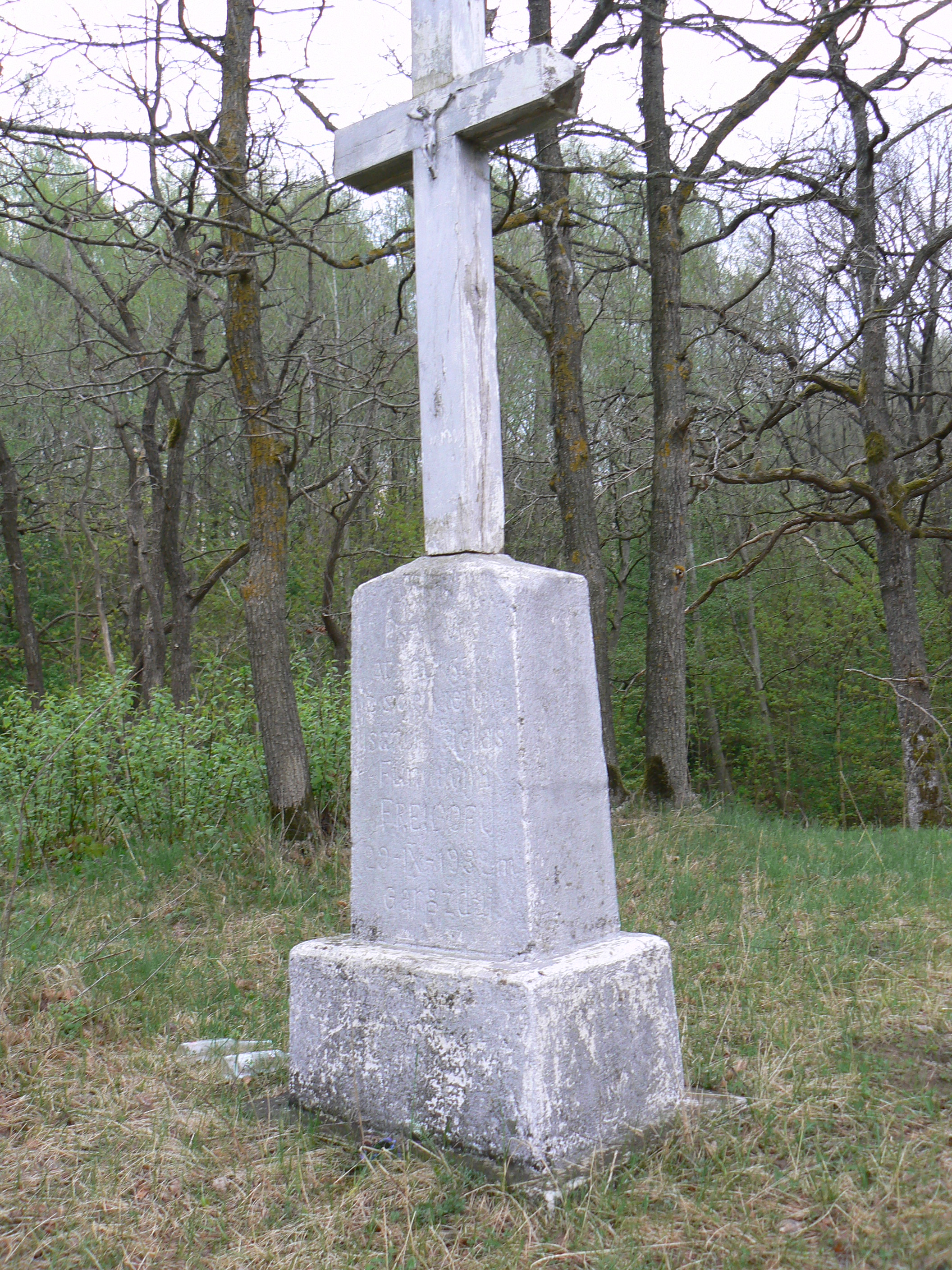 Křížek (z moderní doby, pravděpodobně obnoven v roce 1998) na kopci hradiště (piliakalnis) Maciuičių piliakalnis nad levým (východním) břehem Minije